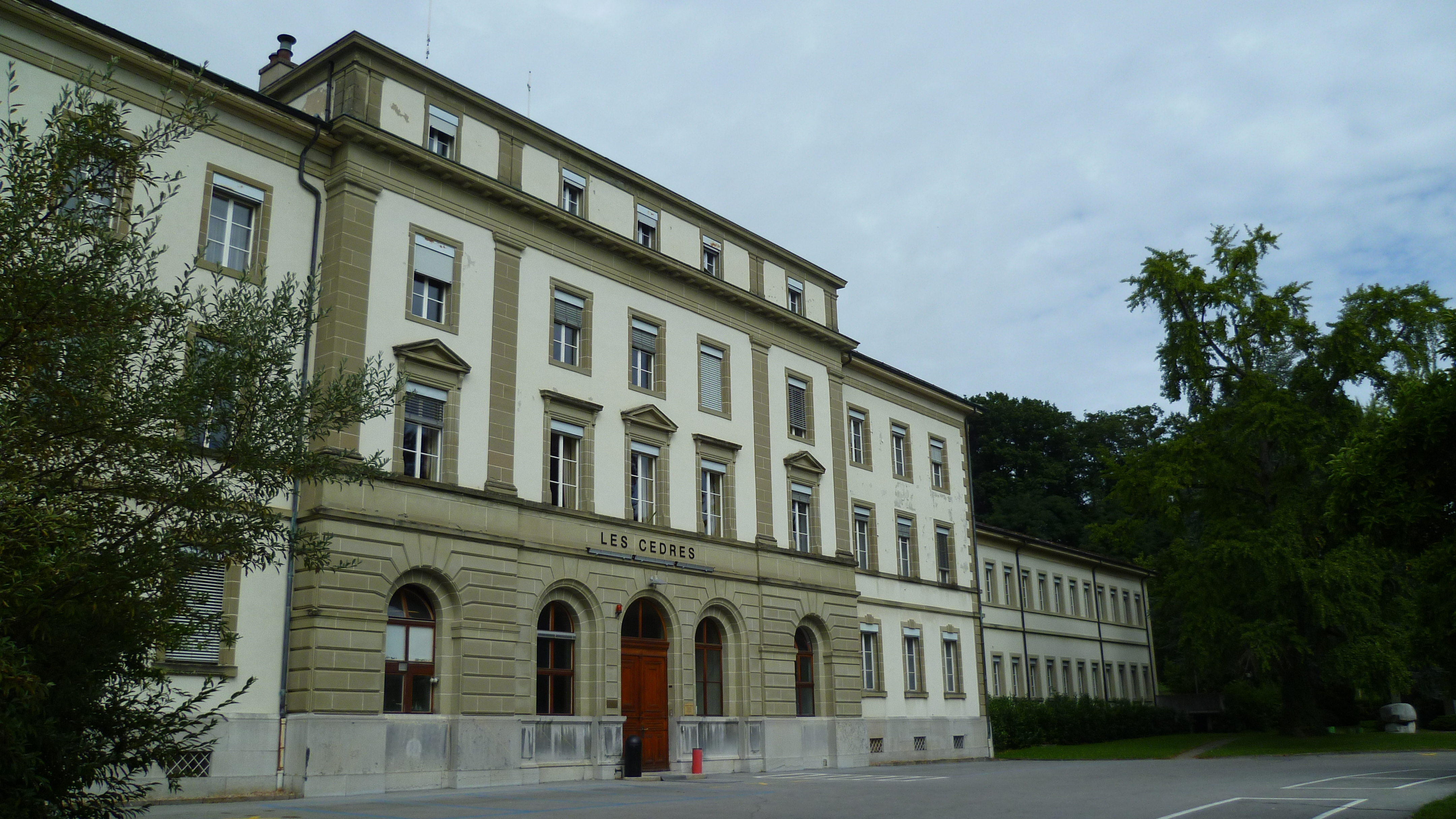 Les Cèdres Clinique de Cery Prilly